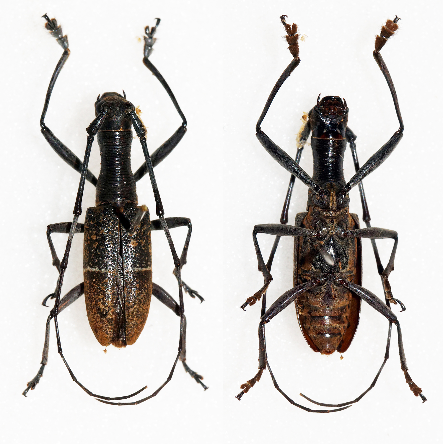 Newman,1842 Sex: Male Data: 03-2011 - Mindanao - Philppines Size: 19mm